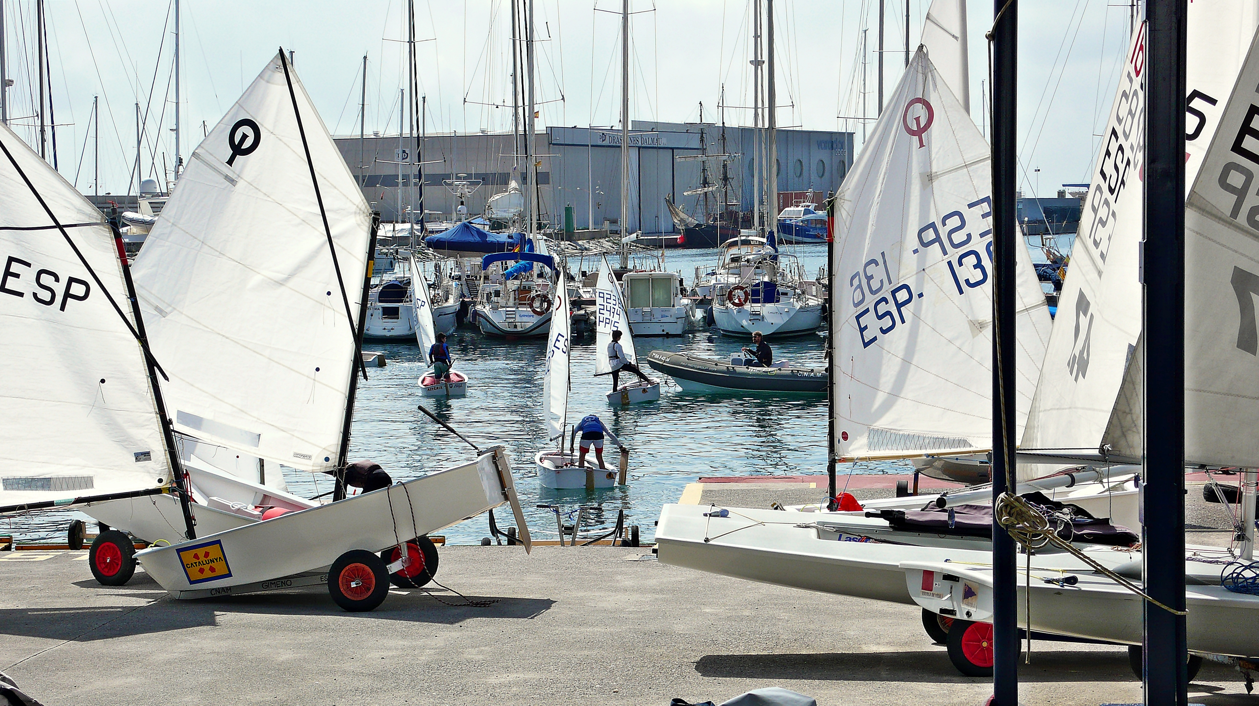 Costa del Maresme